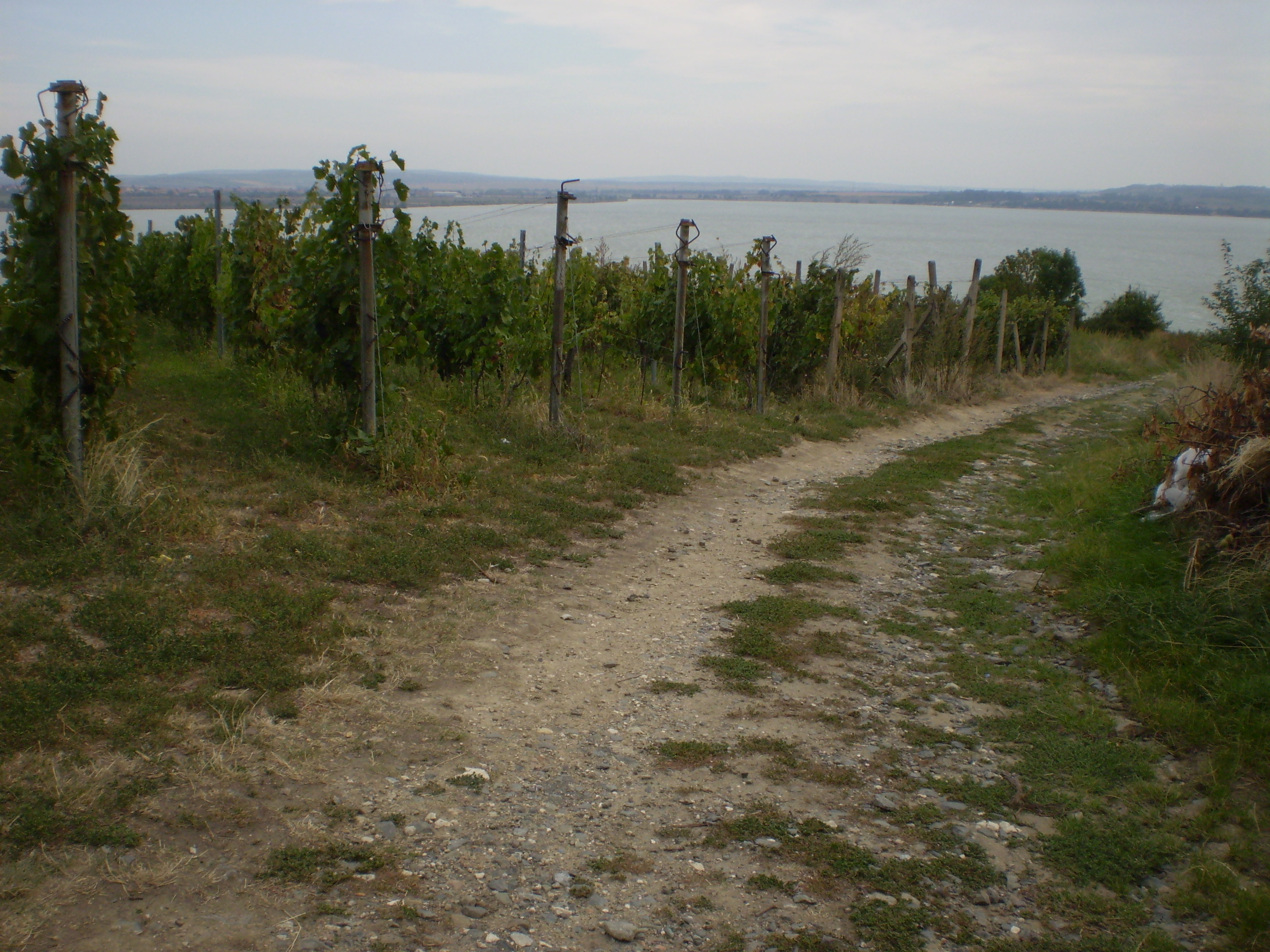 Vinná réva v Pavlově, v pozadí Nové Mlýny.